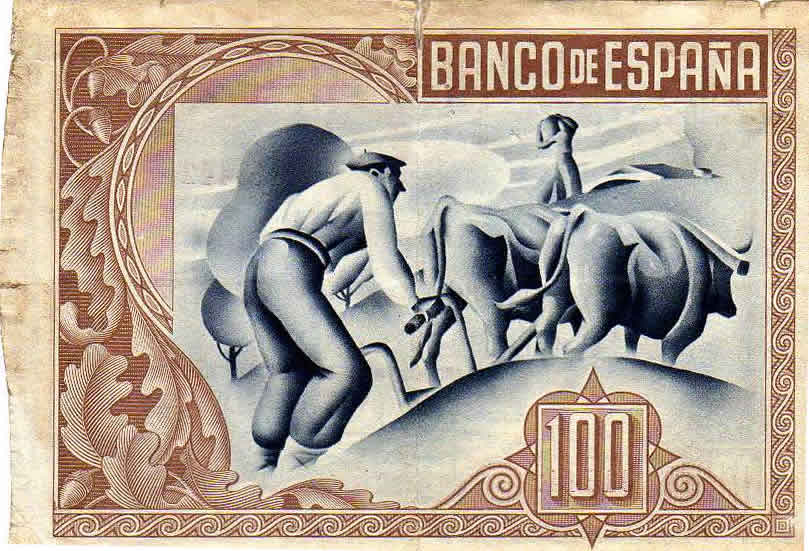 Billet de Pesetas (1937). (Espagne). Particularité : même recto mais différents motifs pour les verso. Quelques exemplaires, portent en violet, le sceau du gouvernement d'Euskadi.